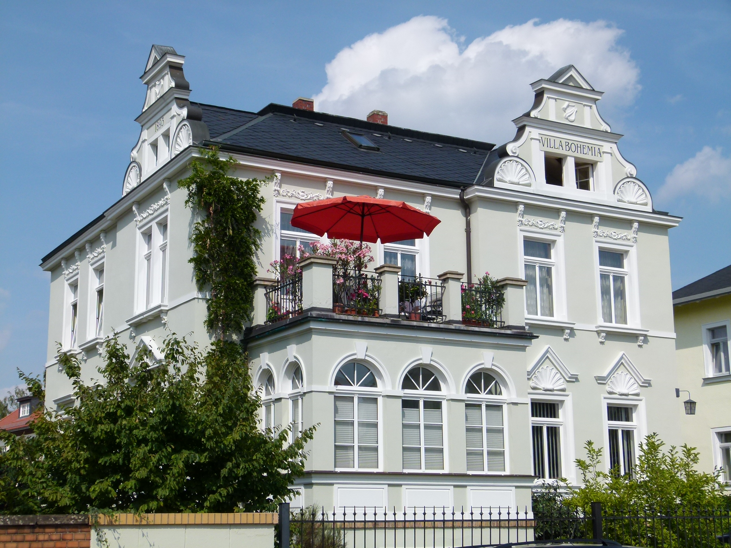 Denkmalgeschütztes Haus, Dr-Rudolf-Friedrichs-Straße 13, Radebeul, Sachsen